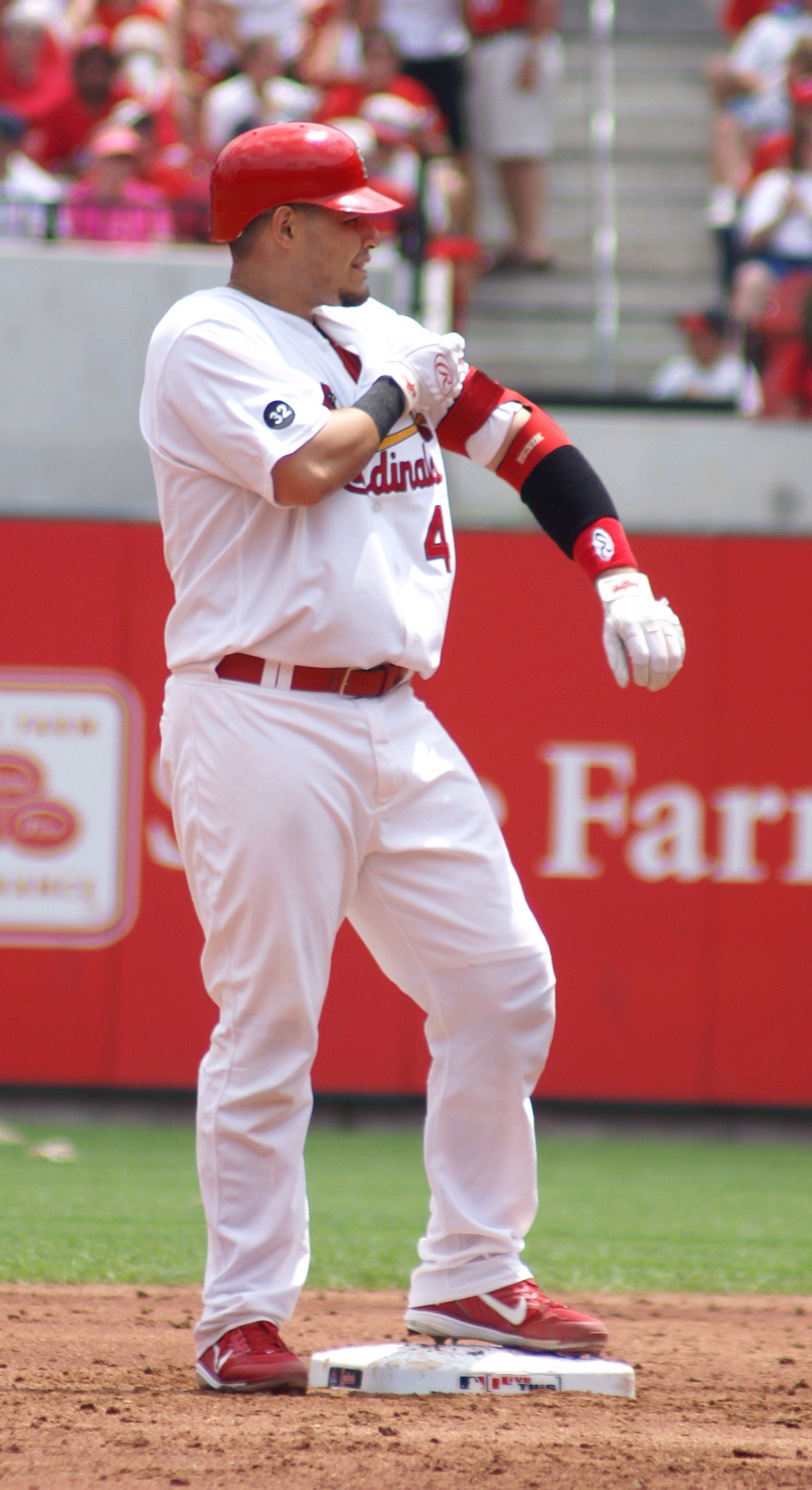 Yadier Molina